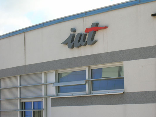 IUT de Roanne